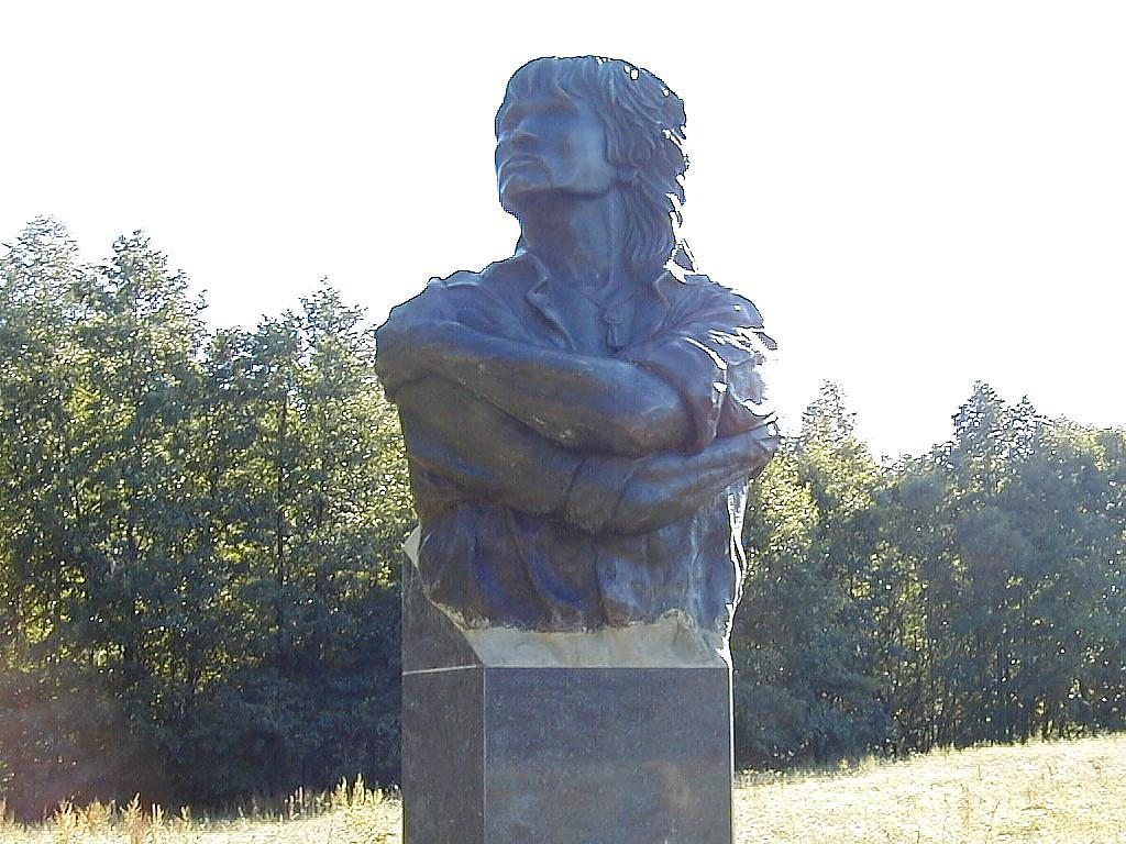 Teitupītes tilts, V.Coja piemineklis 2003-08-09